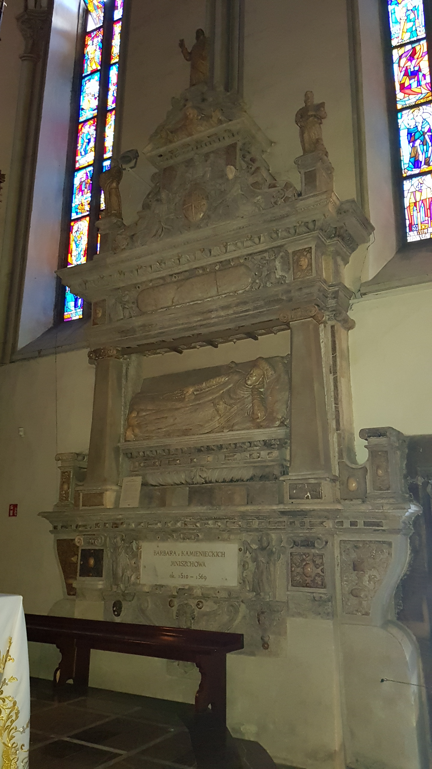 Barbara z Kamienieckich Mniszchowa (zm. ok. 1569) – starościna sokalska i łukowska. Nagrobek renesansowy w prezbiterium kościoła franciszkanów w Krośnie